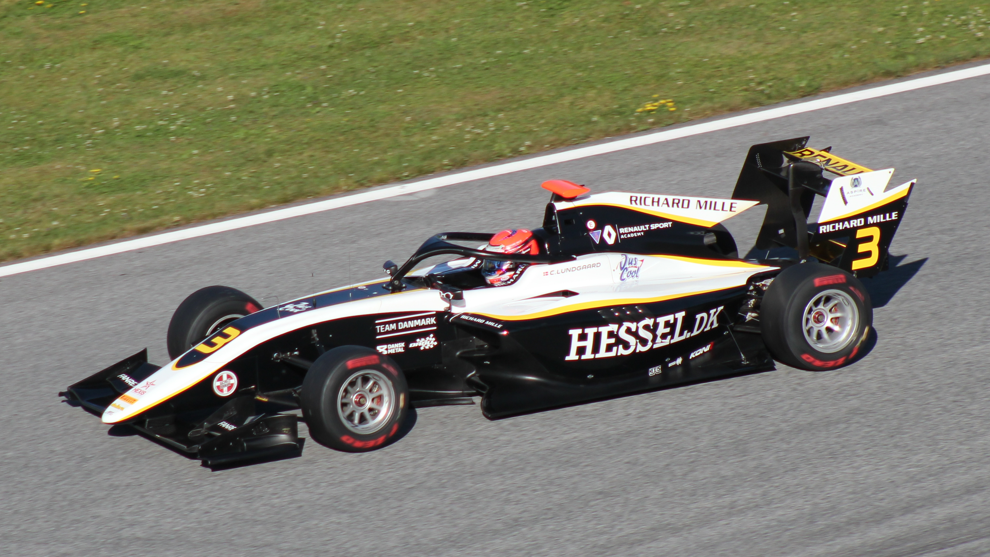 Lundgaard beim Rennwochenende in Österreich 2019